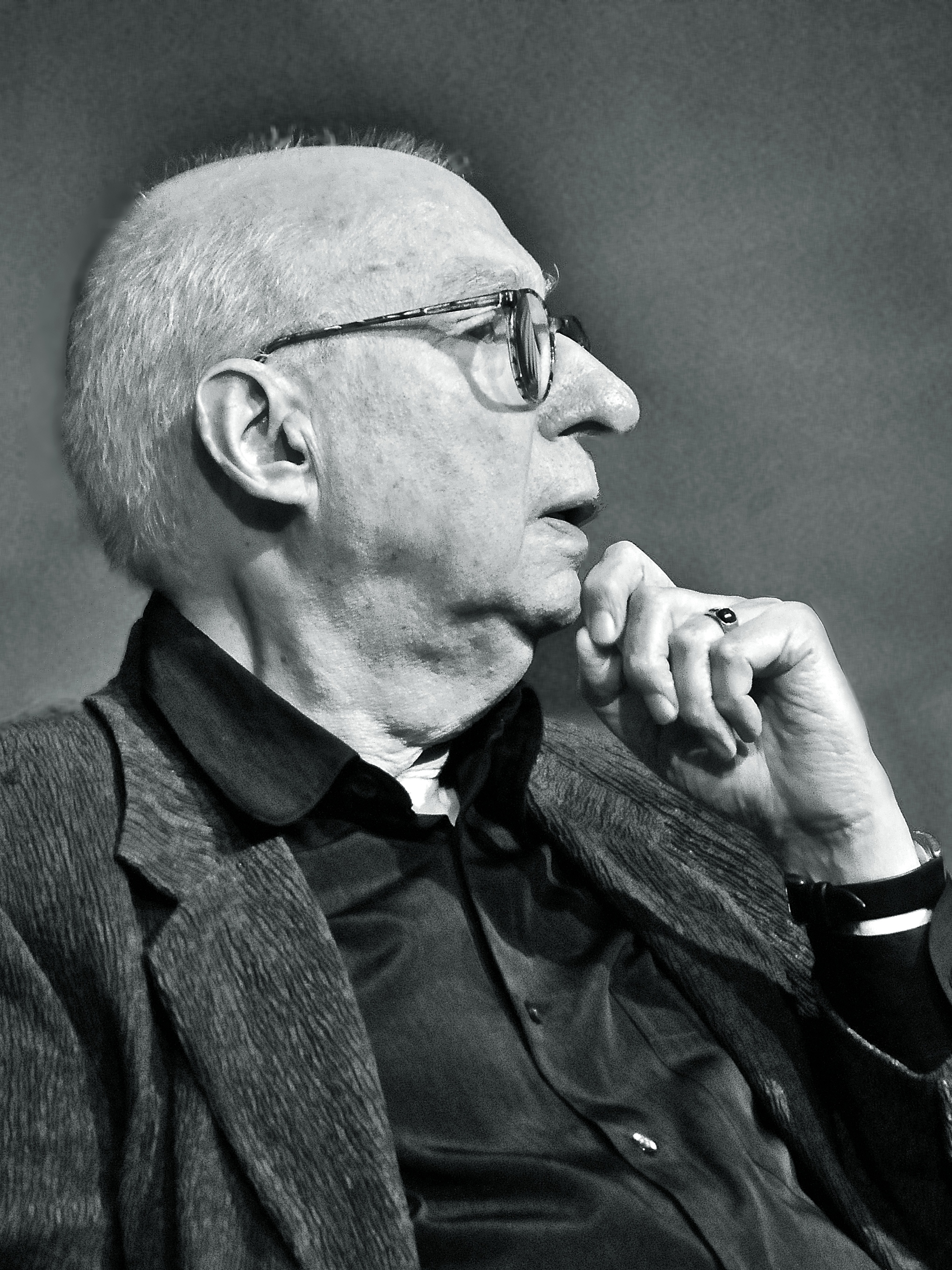 Aribert Reimann im Foyergespräch der Oper Frankfurt am 17.09.2010